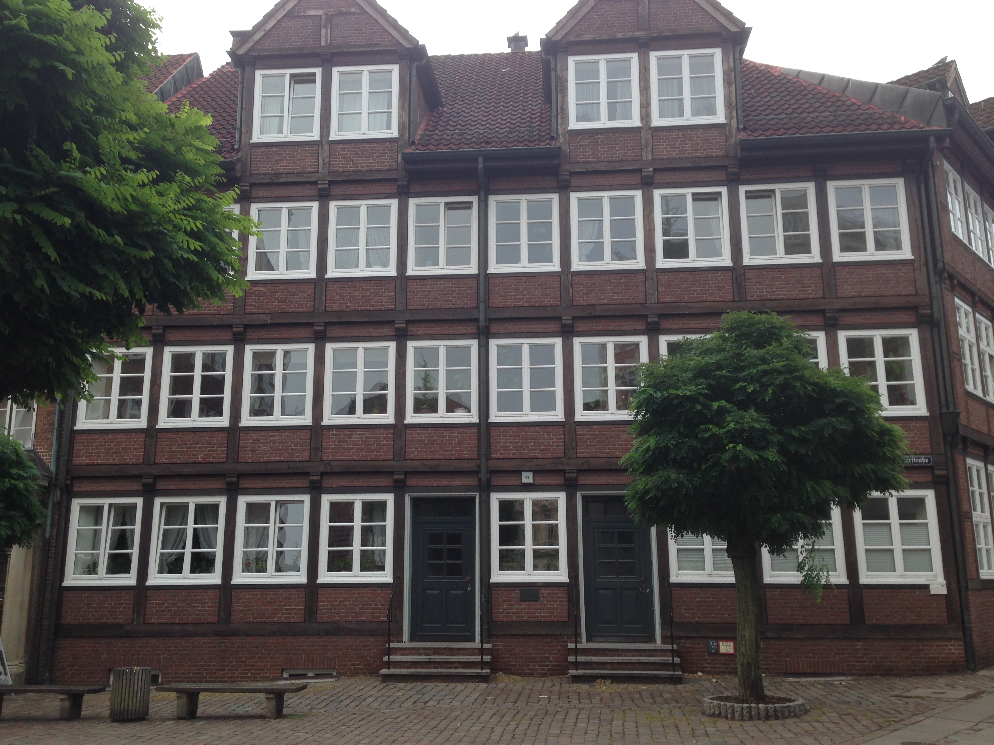 Peterstraße 39 Hamburg, KomponistenQuartier Hamburg